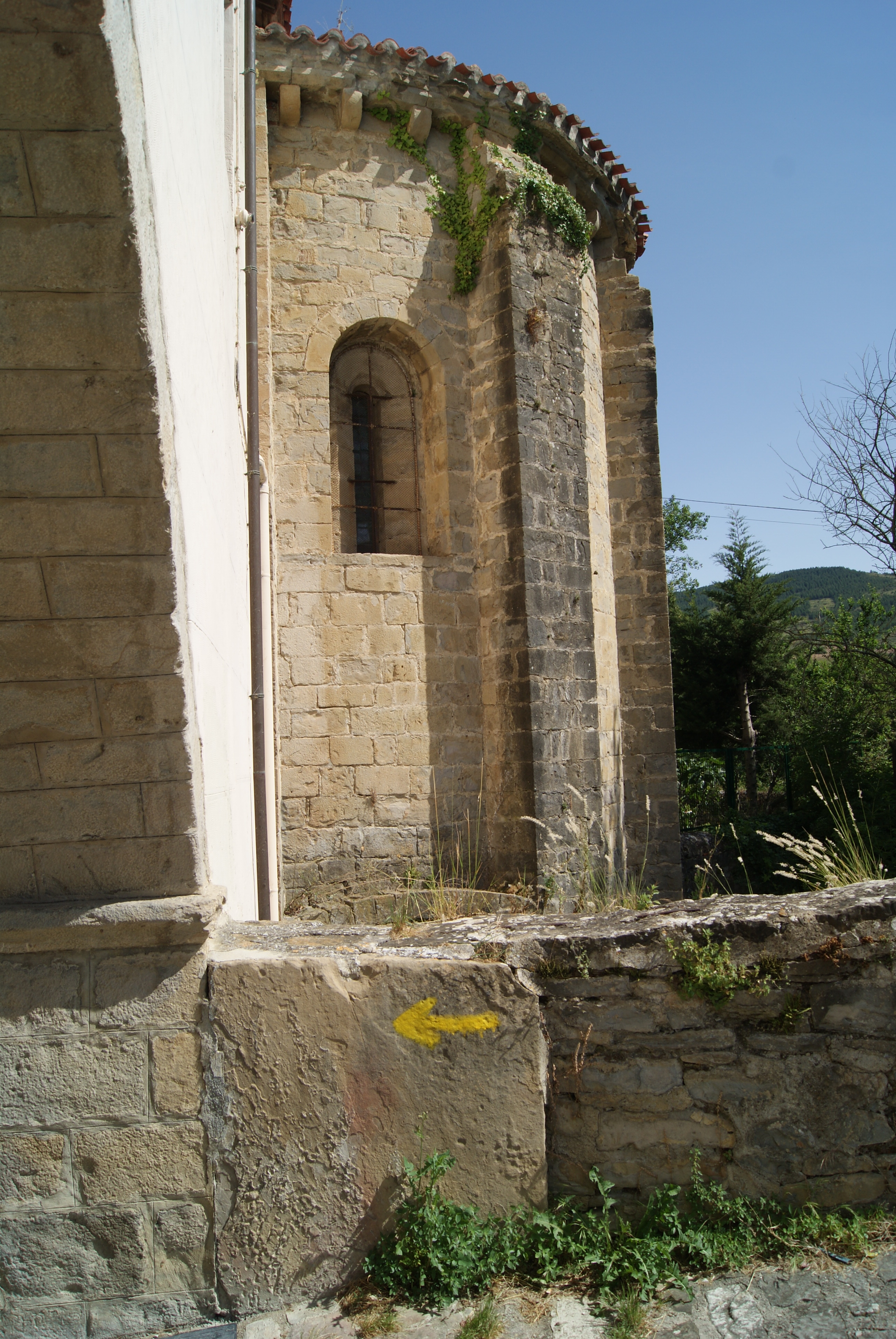 La Trinidad de Arre (detalle ábside, cara este)